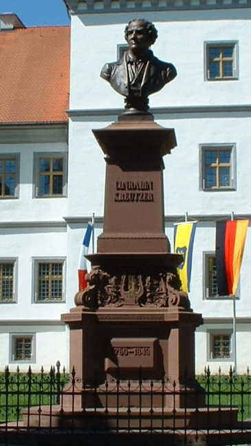 Denkmal zu Ehren Conradin Kreutzers in Meßkirch, dahinter das Schloss der Herren von Zimmern